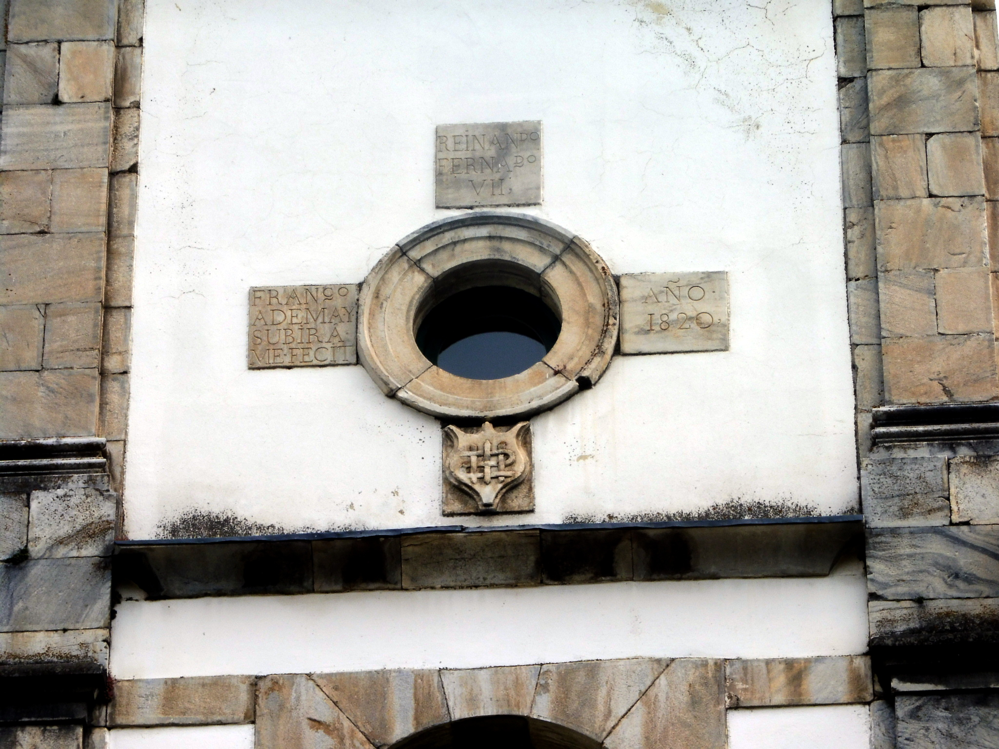 Casa Ademar d'Arròs (Vielha e Mijaran)